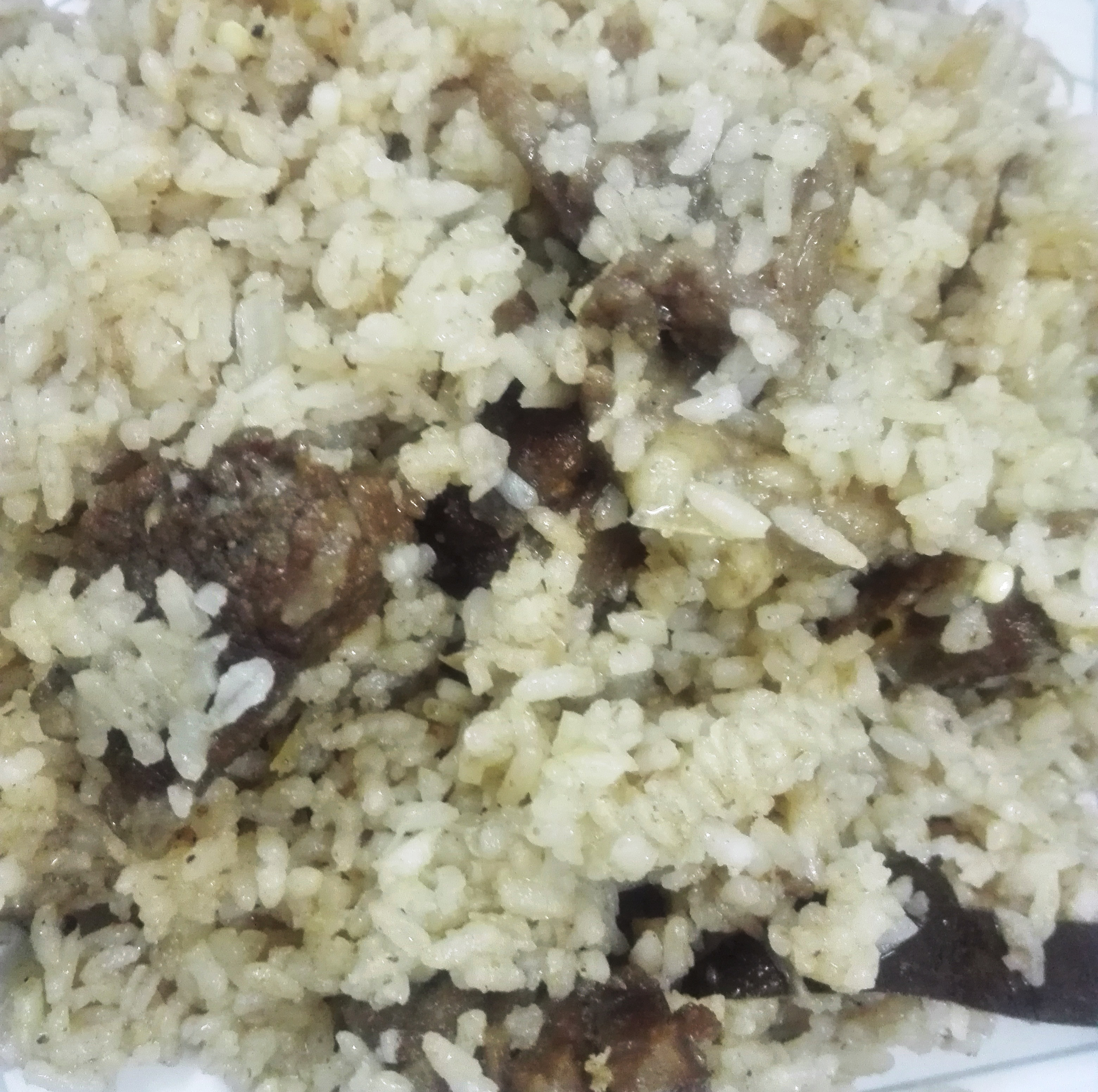 Homemade Tehari, Bangladesh